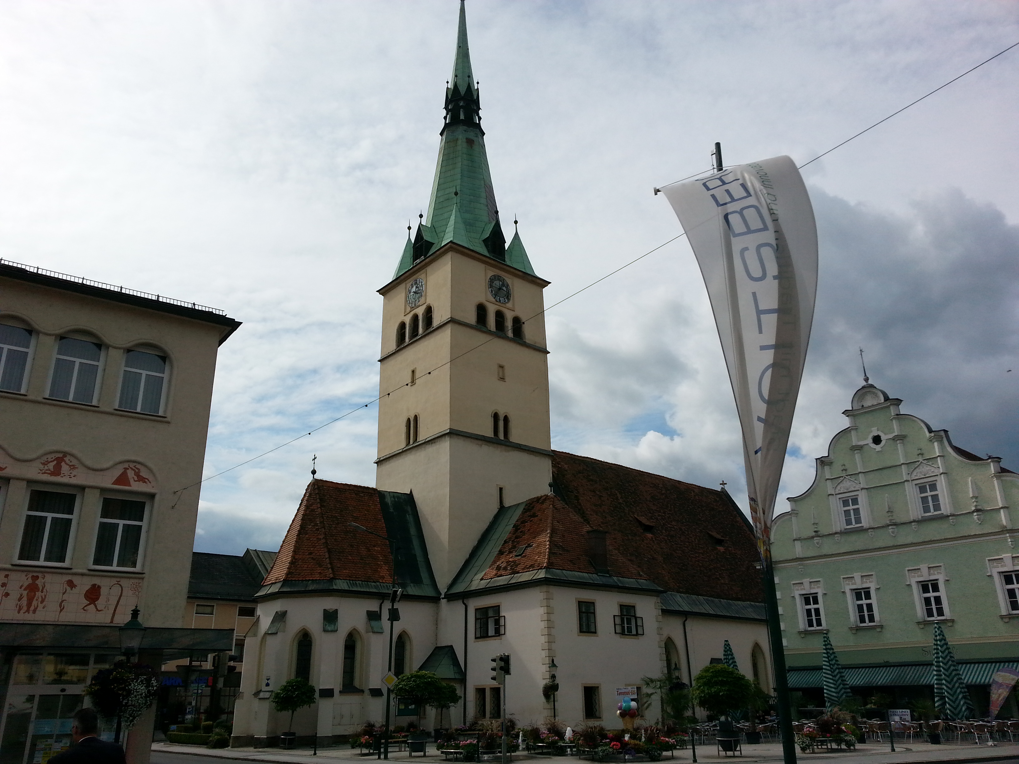 Kath. Filialkirche hl. Michael und ehem. Friedhofsfläche